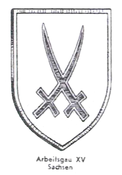 Reichsarbeitsdienst Mützen-Traditionsabzeichen Arbeitsgau XV